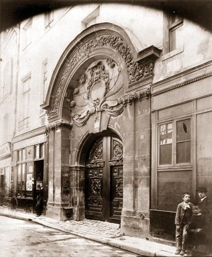 Hôtel Chalons-Luxembourg rue Geoffroy-l'Asnier